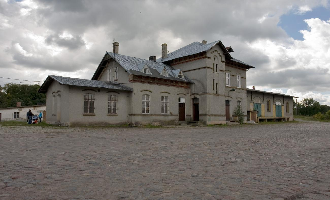 Założę się, że budynek dworca pierwotnie miał ceglane elewacje, w tej samej konwencji jak sąsiedni budynek mieszkalny. Pozostawiono niektóre zbyt wystające przed lico elementy, jak łuki nad oknami, fryzy itp. Przy niesprzyjającym oświetleniu, jakie mi się akurat trafiło, budynek zupełnie wtapia się w tło.